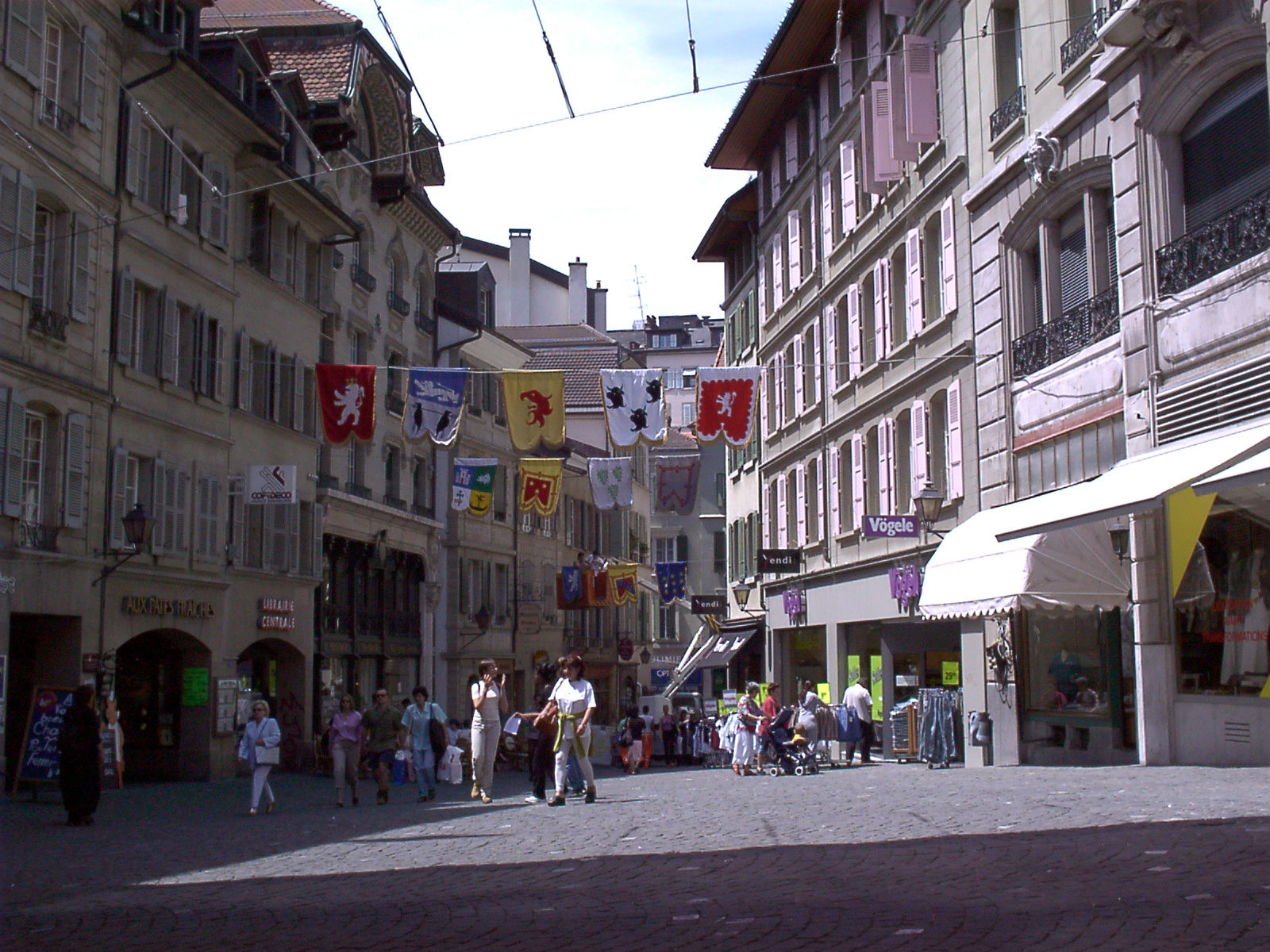 本人撮影 ローザンヌ